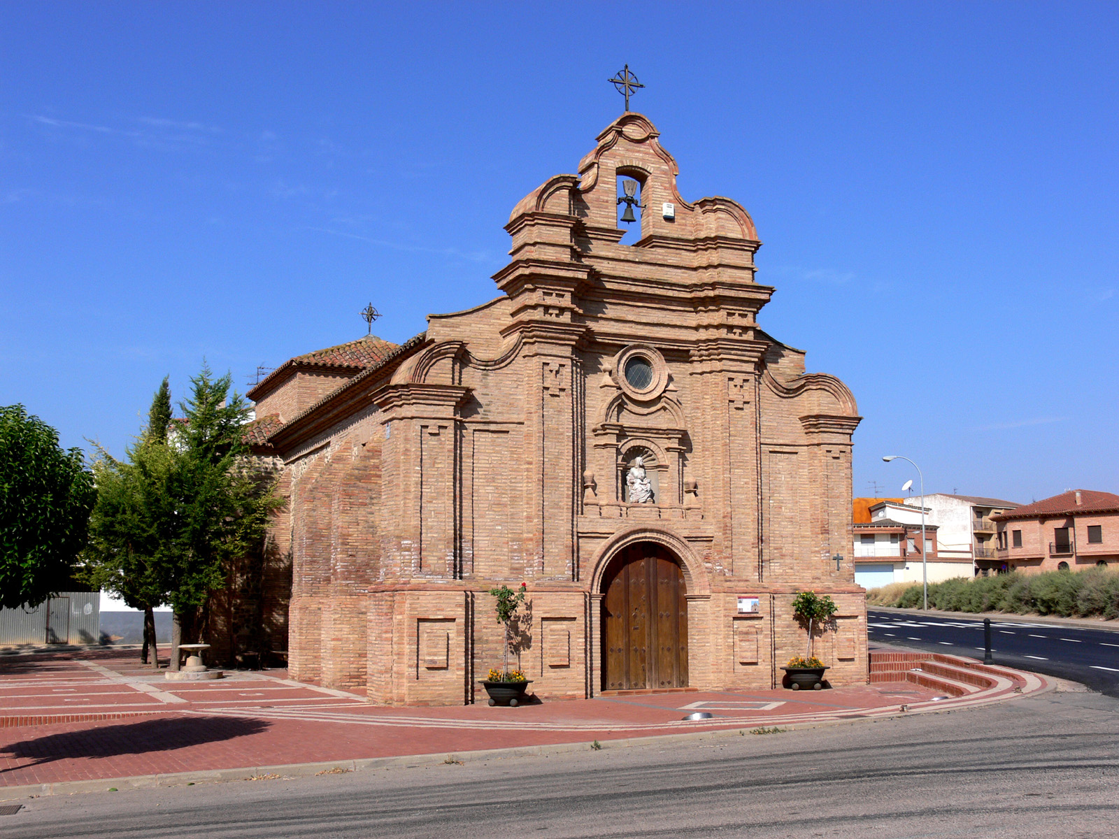 Ermita de la Virgen de los Remedios, Aldeanueva de Ebro, La Rioja, España.